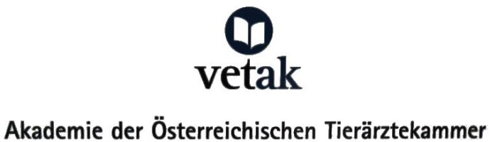 Türschild der Vetak (mit Logo)